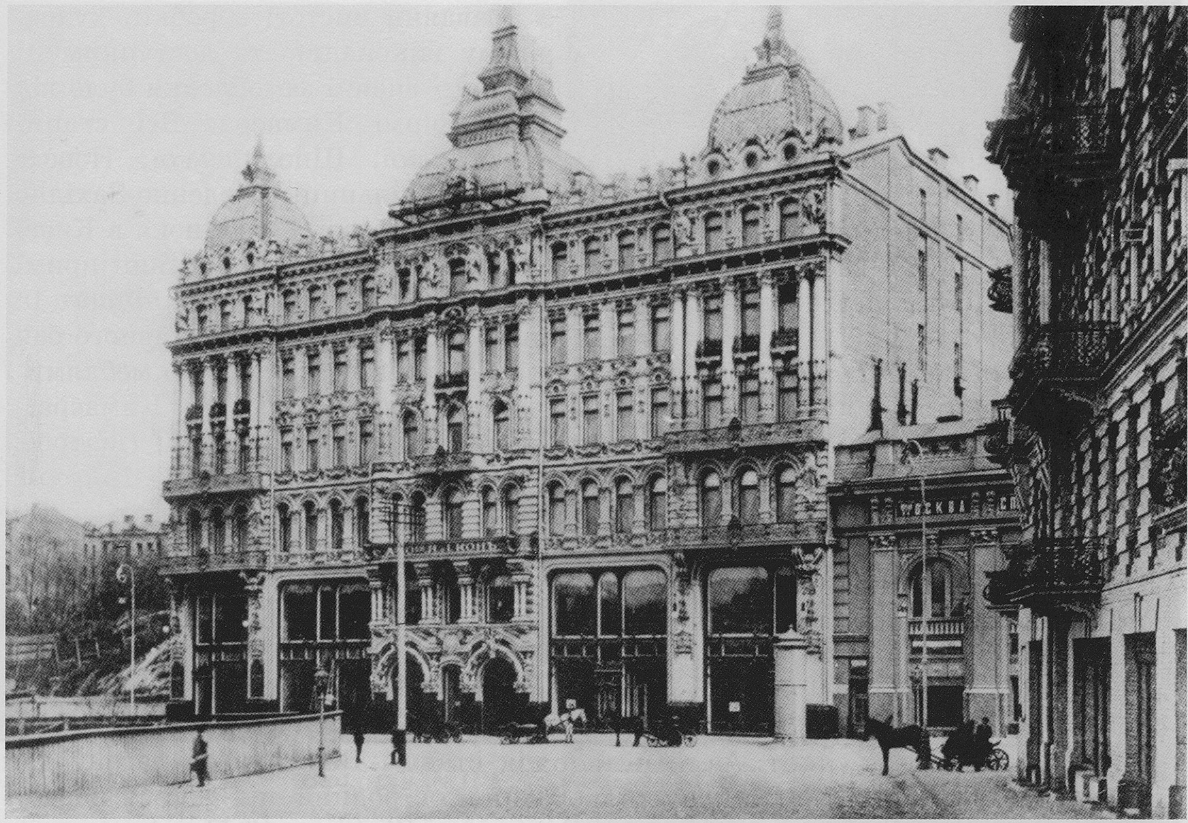 Ginsburg's apartment building (1900—1901) in Kiev, Ukraine. Nikolaevskaya street, 9 (now Gorodetskogo street)